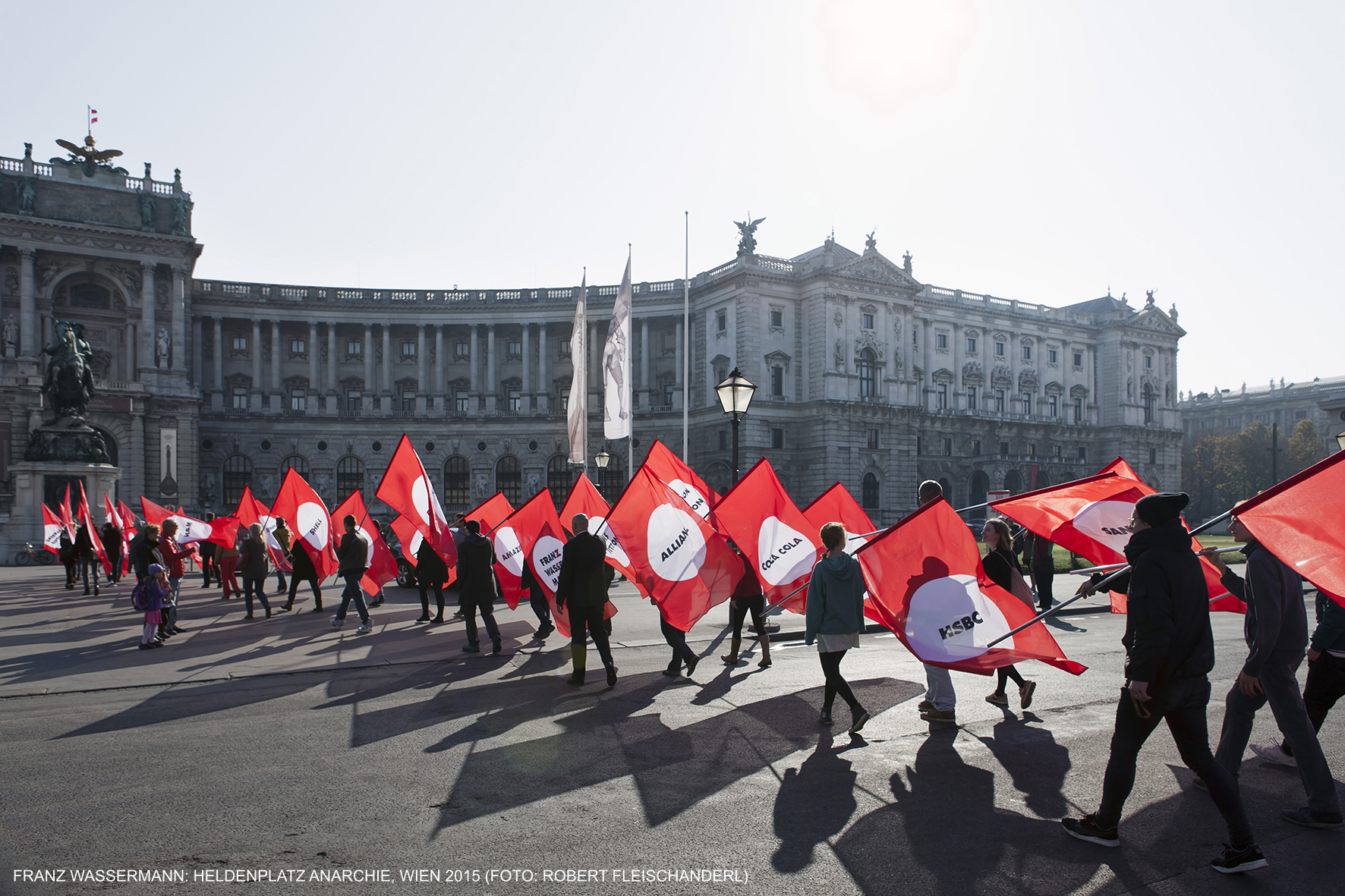 Für die Performance HELDENPLATZ / ANARCHIE marschiert Franz Wassermann gemeinsam mit 49 FahnenträgerInnen auf dem Heldenplatz in Wien auf. Die eigens für die Performance entwickelten Fahnen erinnern an die Fahnen der NationalsozialistInnen, zeigen aber an der Stelle, wo in der historischen Version ein Hakenkreuz sitzt, die Namen von Konzernen, Hedgefonds und Banken. Franz Wassermann: HELDENPLATZ / ANARCHIE, 2015 (Foto: Robert Fleischanderl)